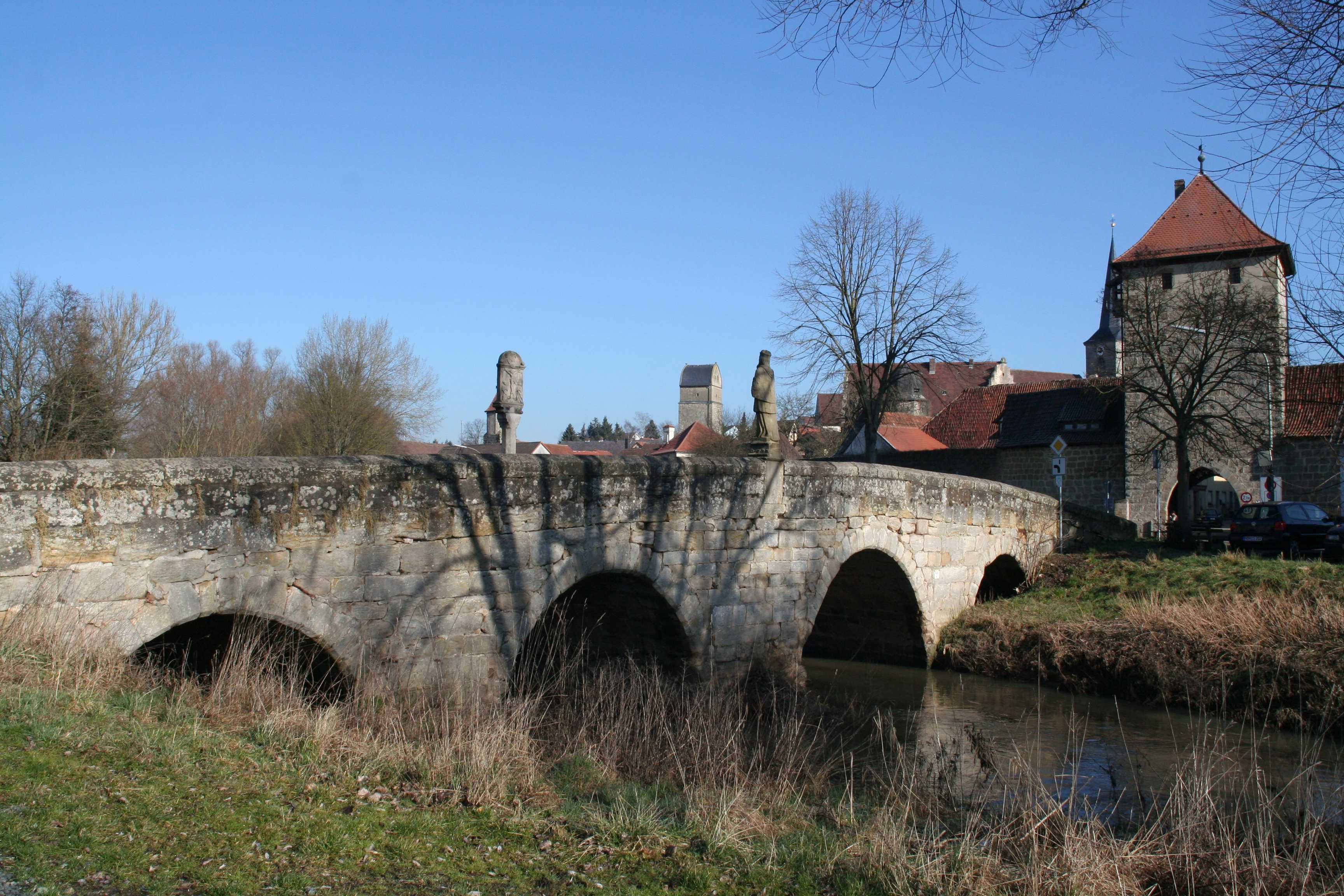 Rodachbrücke in Seßlach, Landkreis Coburg